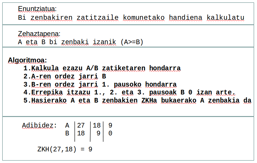 Bi zenbaki osoren zatitzaile komunetako handiena kalkulatzeko algoritmoa.